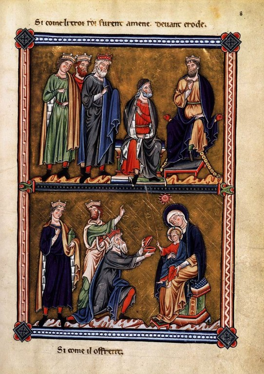 Žaltář Ingeborg Dánské